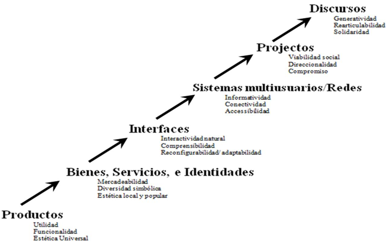 Traducción del inglés y adaptación con autorización del autor Klaus Krippendorff de la figura 1.1 del libro Krippendorff, K. (2006). The semantic turn: A new foundation for design. Boca Raton: CRC/Taylor & Francis. p.6